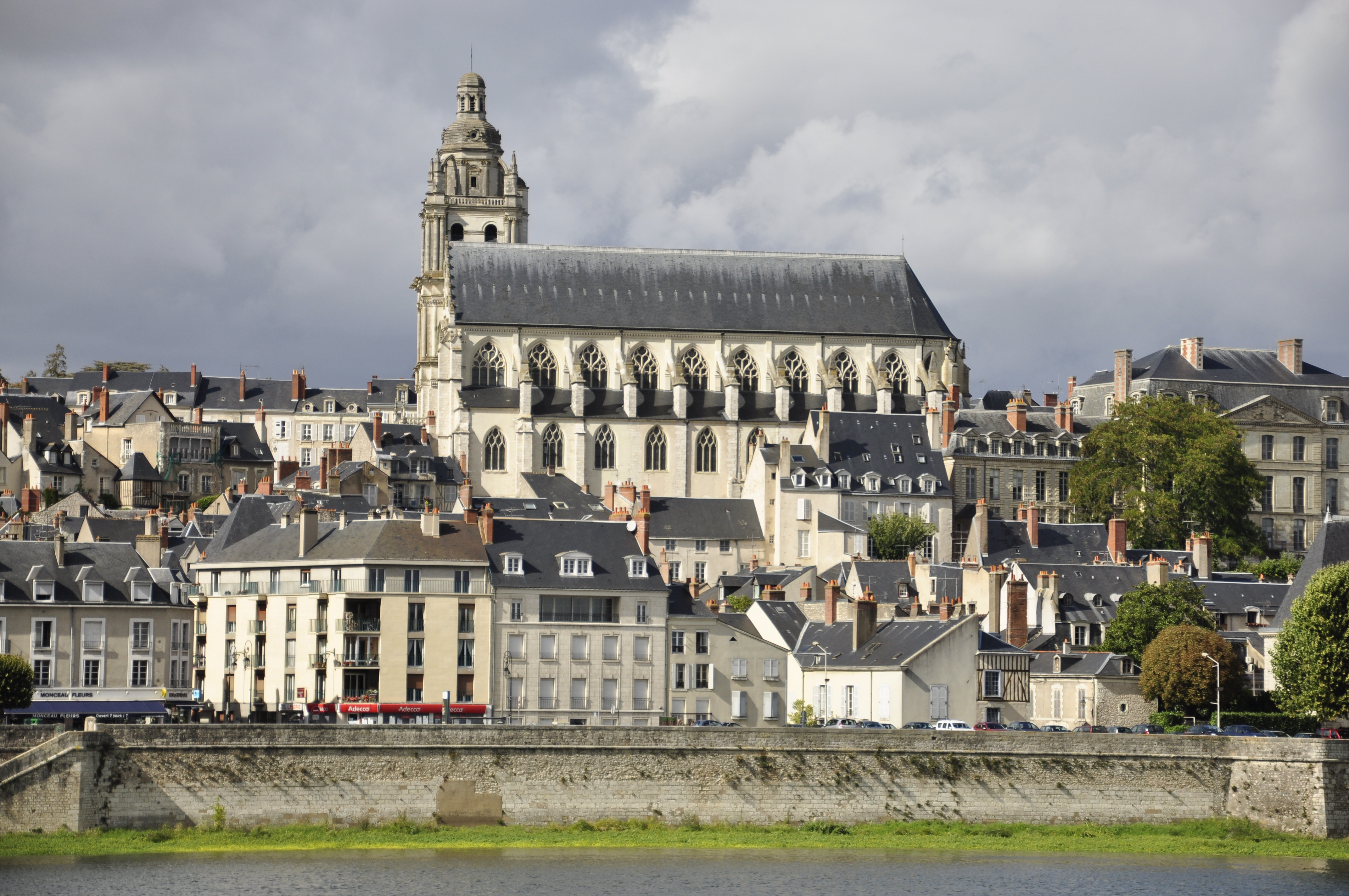 Cathédrale St Louis vue de la Loire, Blois (41) .